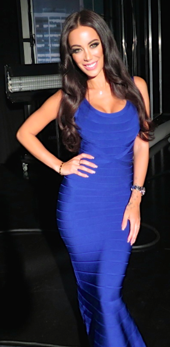 Rebecca Stella Simonsson, 2014